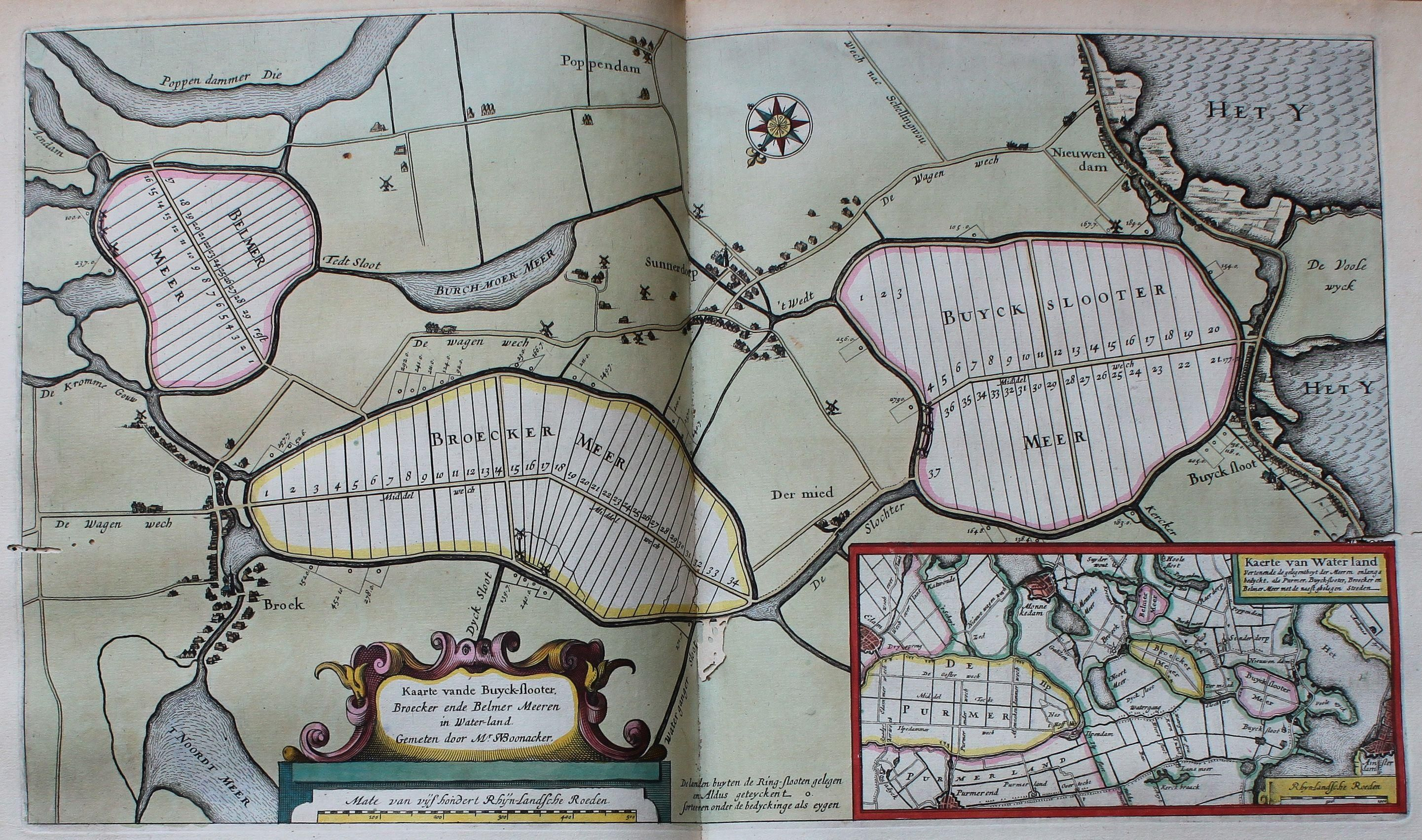 Descripción bibliográfica: Geographia Blaviana. - [Amsterdam : Juan Blaeu, 1659] . - [32], VI, 96 p., 34 f., h. 35a, 35b, 35c, 35d, 36-44 f., 34, [2], 36-40, [2], 43-70 [i. e. 75], [1] f., [20] p. de map., [9] f. de map., [4] f. pleg. de map., [2] f. de plan., [2] f. ge grab. : |bil. ; |cFol. marca major (57 cm.) . - En la dedicatoria a Felipe IV: "Presenta ... El Atlas Universal y Cosmographico de los orbes y terrestre ... Juan Blaeu" . - Título tomado del frontispicio. -- Privilegio fechado en 1659. -Errores de pag. - Sign.: 1, *2, **3, ***-****2, a-e2, A-I2, K1, L-Z2, Aa-Dd2, 4 2, Ee-Ff2, A-I2, K1, L2, M1, N-Y2, Z5, Aa-Dd2, Ee1, A-D2, E-F1, G-I2, K-L1, M-O2, P1, Q-Z2, Aa-Bb2, Cc1, Dd3, Ff-Zz2, Aaa-Bbb2, . - Frontispicio grab. col. -- Incluye un total de 49 il. entre map., plan. i grab. Materia: Atlas - Obras anteriores a 1800 Impresor: Blaeu, Joan, 1596-1673, imp. Lugar de impresión: Holanda. Amsterdam Localización: Vea la ilustración en su contexto Visite también la exposición "Cartografía histórica en la Biblioteca de la Universidad de Sevilla"